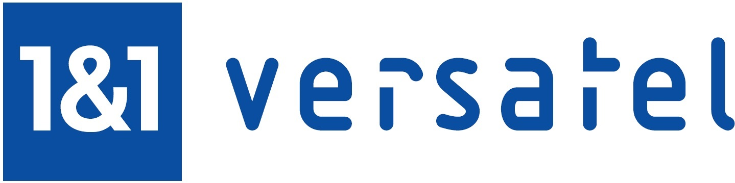 Logo der neuen 1&1 Versatel GmbH